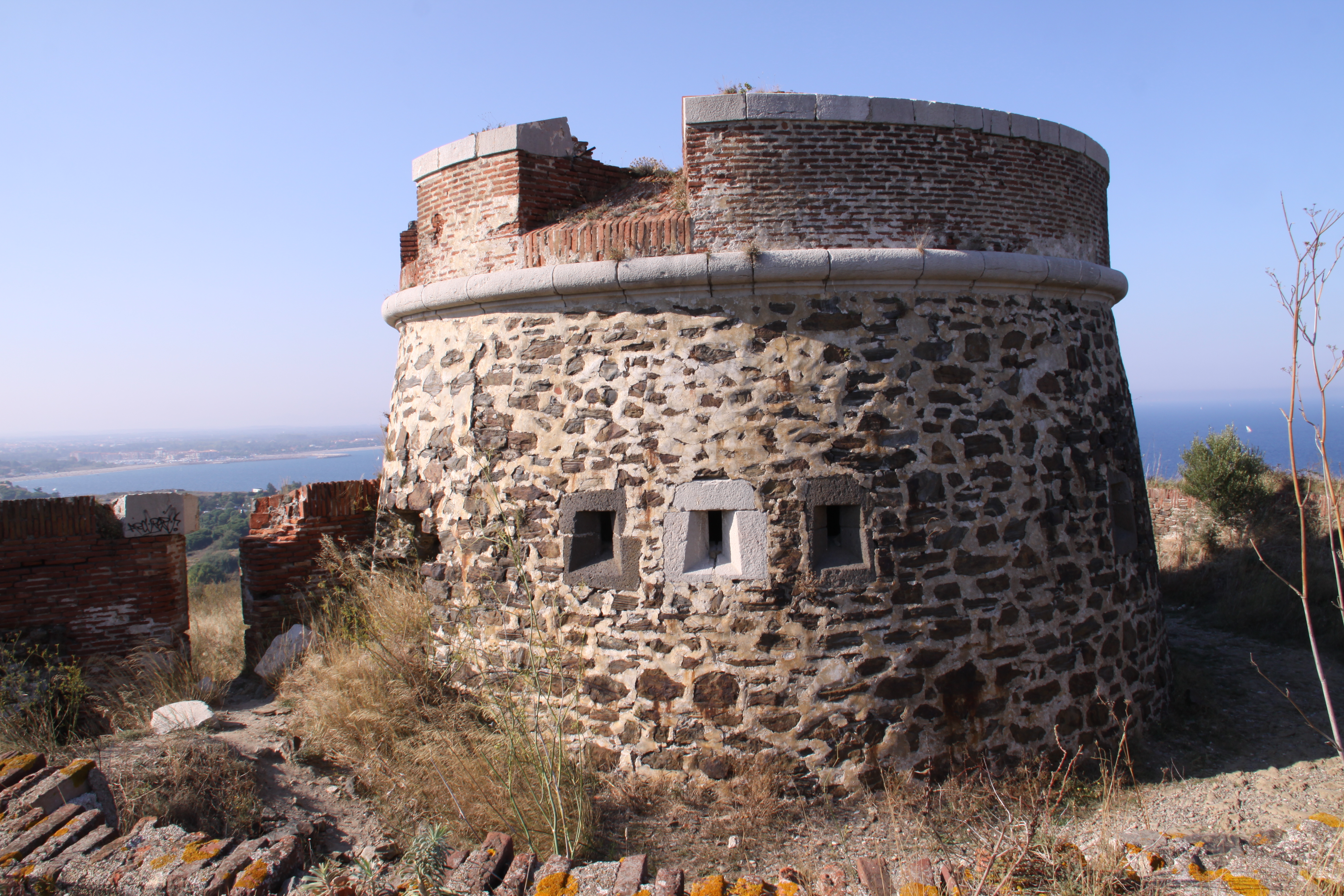 La Tour de l' Etoile (appelée aussi Fort Rond) de Collioure (1ère moitié du 18ème siècle) est un édifice militaire. La Tour de l' Etoile fait partie de l' ensemble "Fort Carré, Tour de l' Etoile et caponnière" qui ne forme qu'un seul MH. Monument Historique classé en 1991. PA00104002. Collioure, Pyrénées-Orientales, France